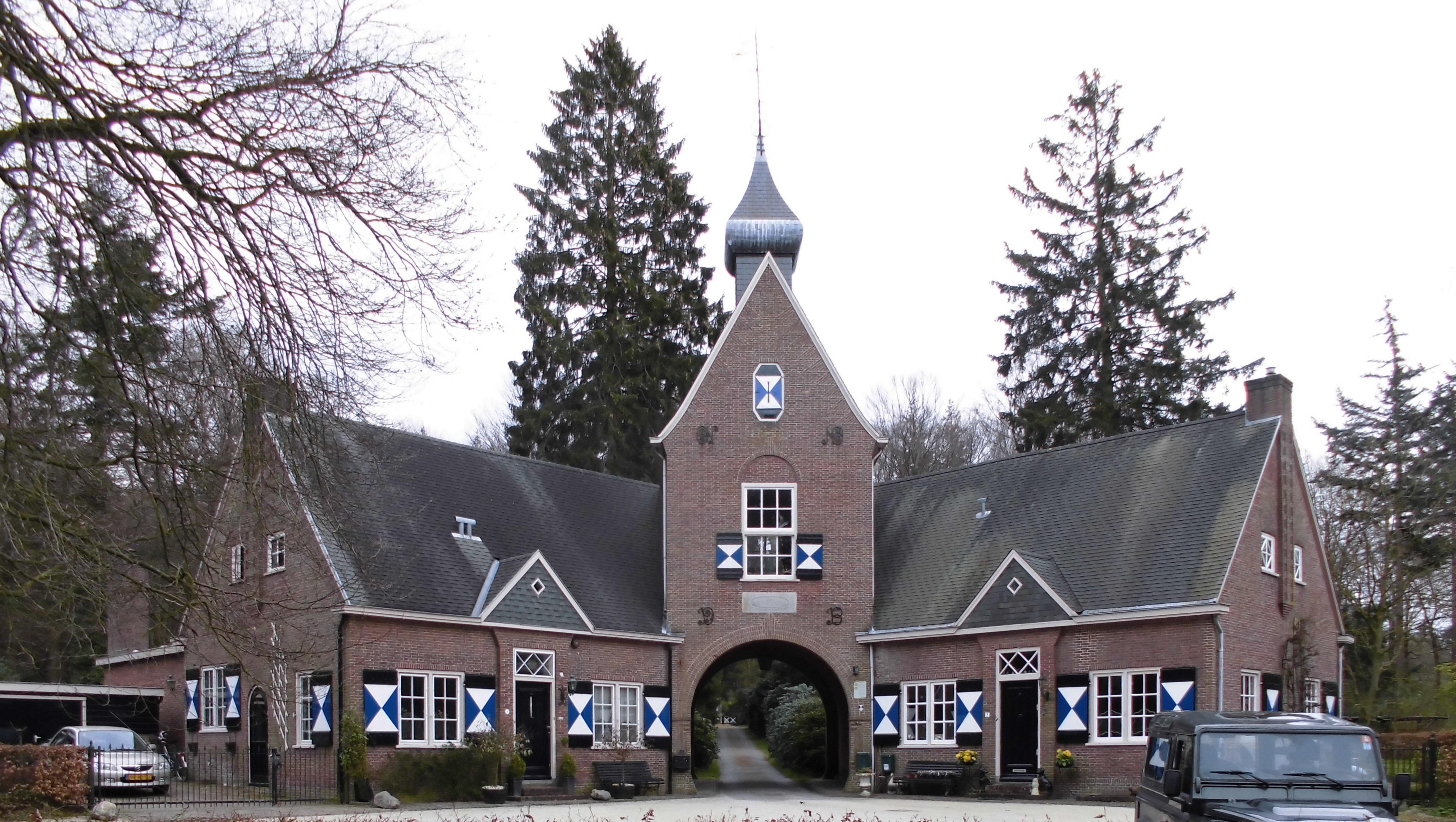 Poortgebouw De Ruiterberg, Maarsbergseweg 2 Doorn